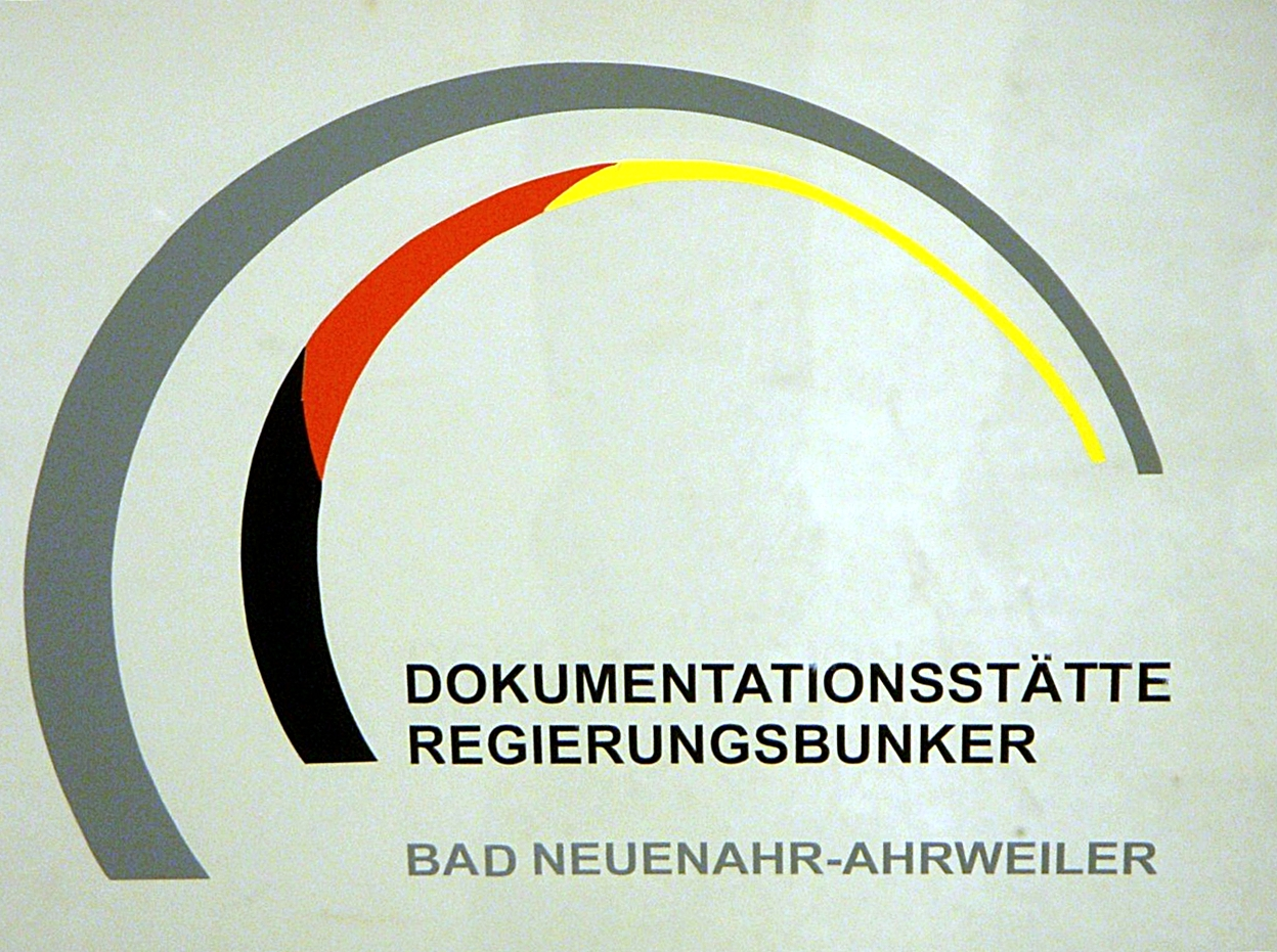 Logo des Museums „Dokumentationsstätte Regierungsbunker“